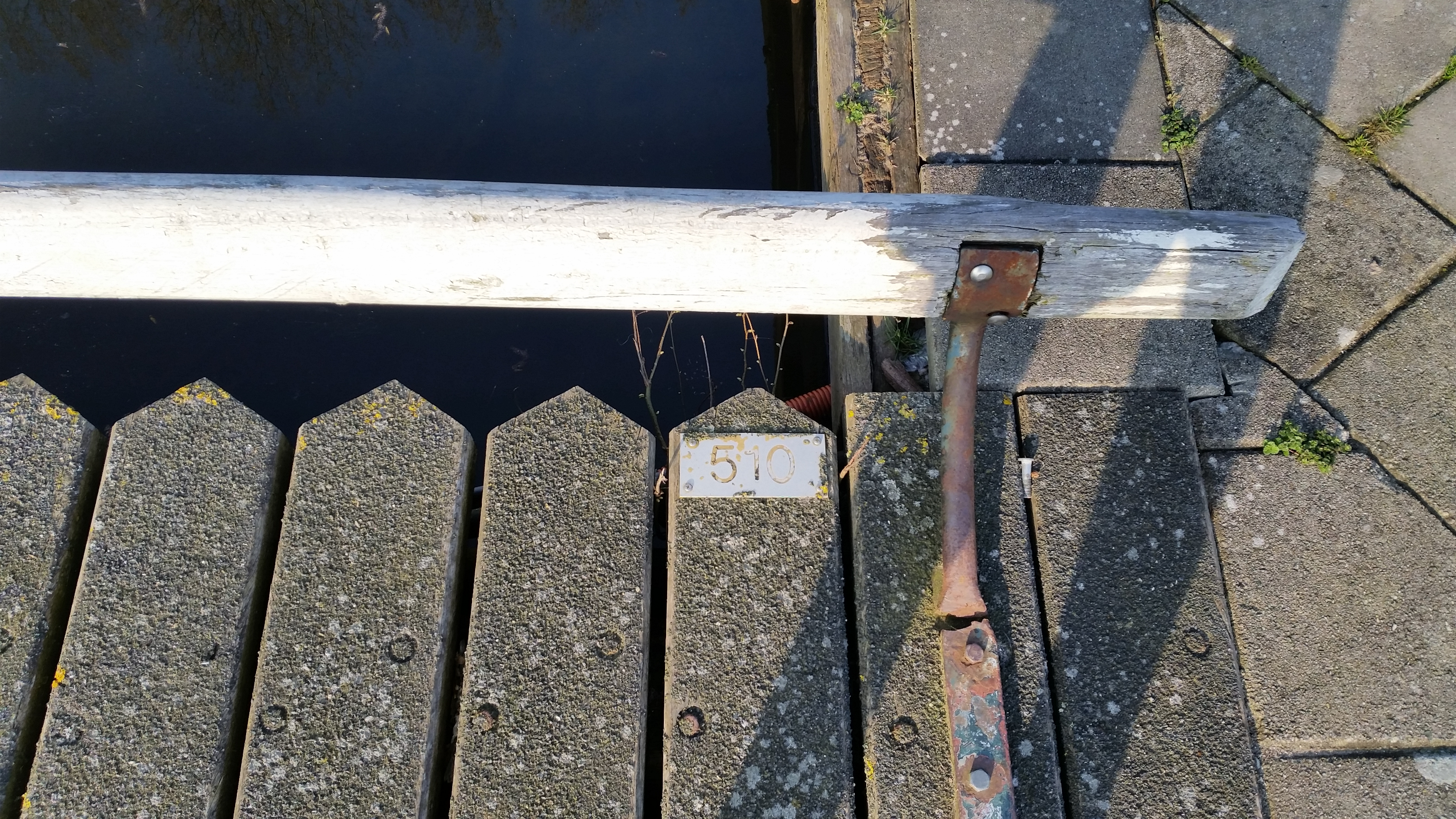 Nummerplaatje van Brug 510 (in Amsterdam)